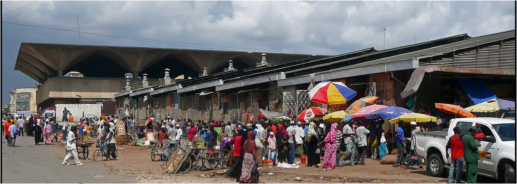 Kiswahili: Picha ya Kariakoo kwa nje - katika miaka ya hivi karibuni, yaani, 2000 kwenda juu.